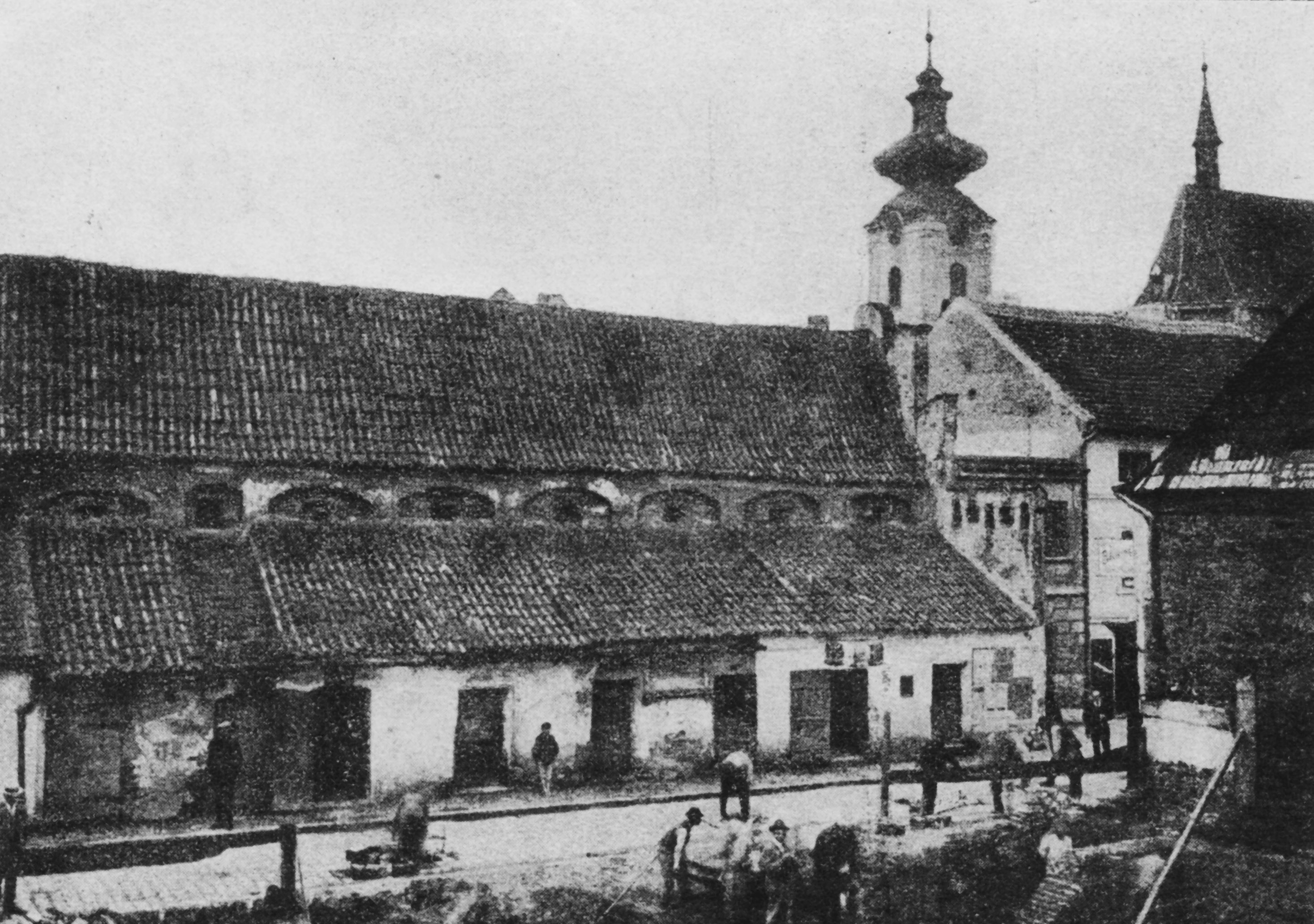 Album starých Budějovic. Masné krámy, Bílá věž. V popředí zbořeniště, kde stával renezanční Ettmayerův dům (orig. text: Masné krámy. Jedna z nejcennějších památek města, ve svém jádře z počátku 16. stol. Na západním štítu užito opětně motivů hradebních.)